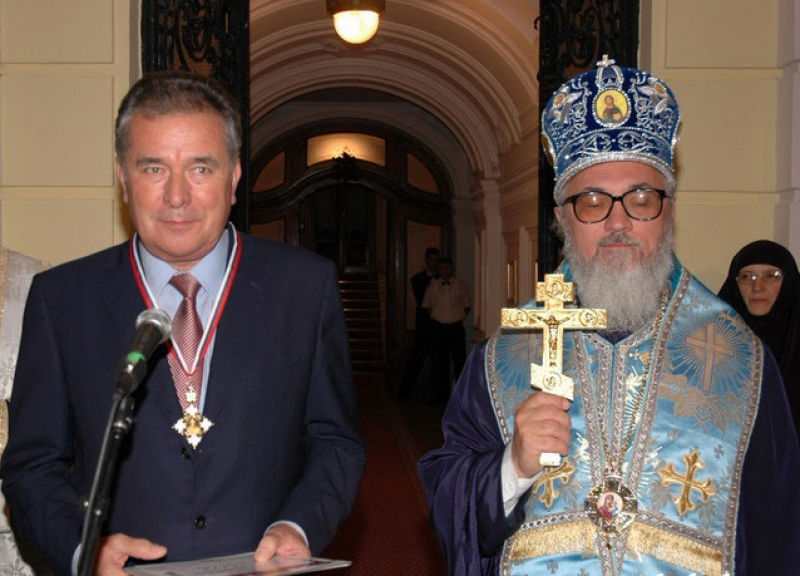 Nagrada zivotno delo Miodrag Babić